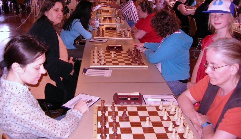 Anna Rudolph und Barbara Hund, Deutsche Frauen-Mannschaftsmeisterschaft der Länder 2007 in Braunfels. Neben Anna Rudolph sitzt Heike Vogel. Rechts hinter Barbara Hund steht Sarah Hund.